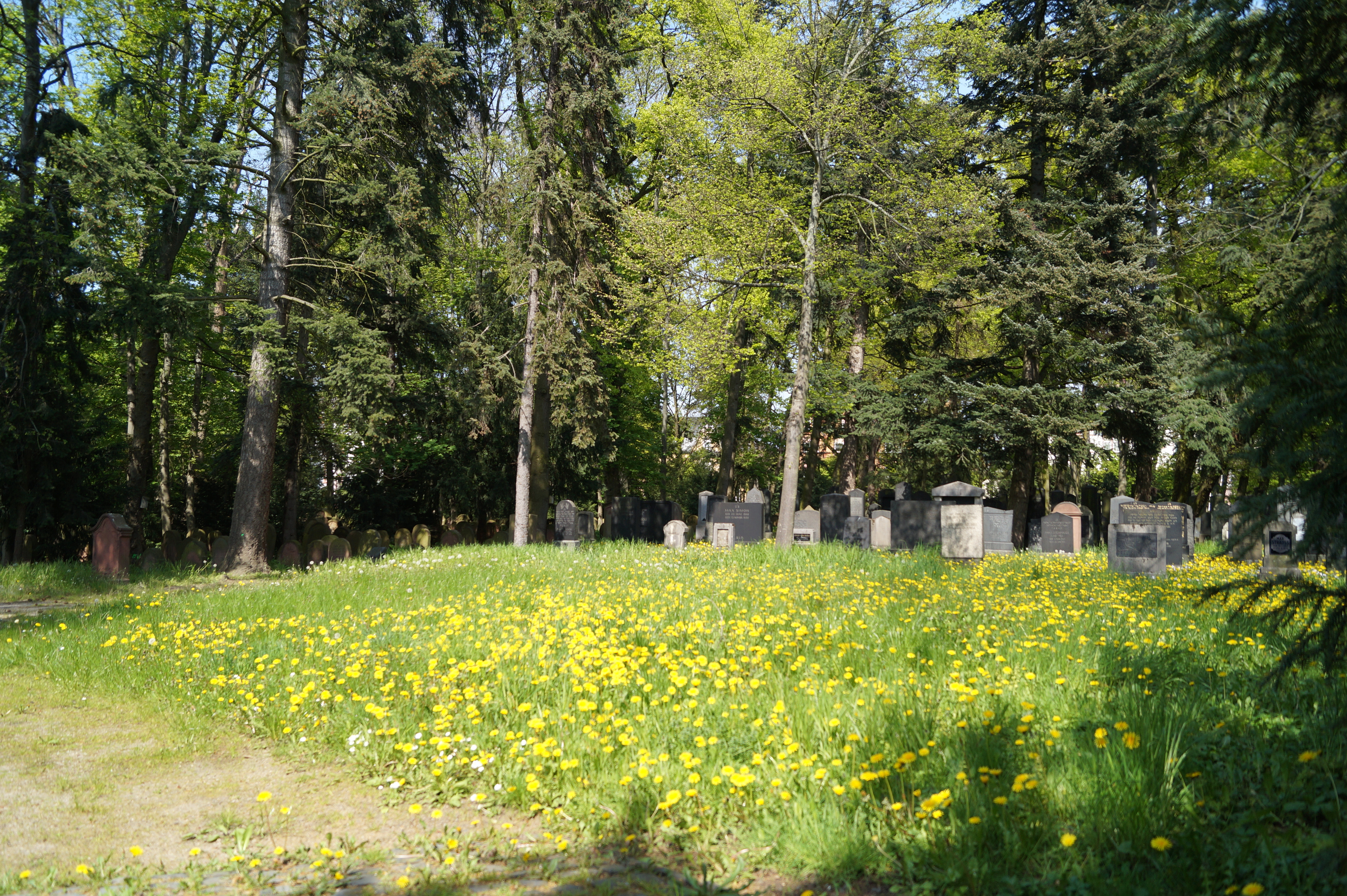 Alter Jüdischer Friedhof in Hanau, Ansicht von Süden.